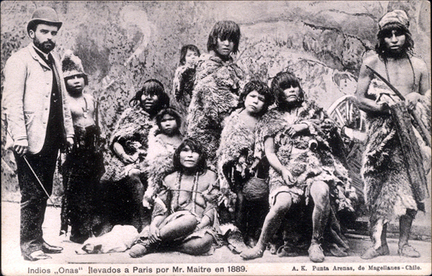 Indios "Onas" Levados a Paris por Mr. Maitre en 1889.